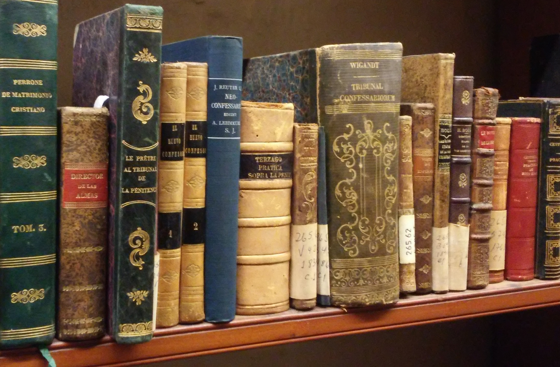 Libros pertenecientes a la colección de la Biblioteca Patrimonial Recoleta Dominica